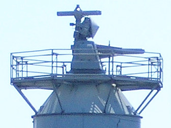 Goalkeeper test installation on the roof of Thales building Location: Hengelo (Overijssel), Netherlands Keywords: Goalkeeper, HSA, Hollandse Signaal Apparaten, Signaalapparaten, Thales nl: Goalkeeper testopstelling op het dak van Thales ("Signaal"). Locatie: Hengelo (Ov), Nederland Trefwoorden: Radar, Goalkeeper, Afweergeschut, HSA, Hollandse Signaal Apparaten, Signaalapparaten, Thales